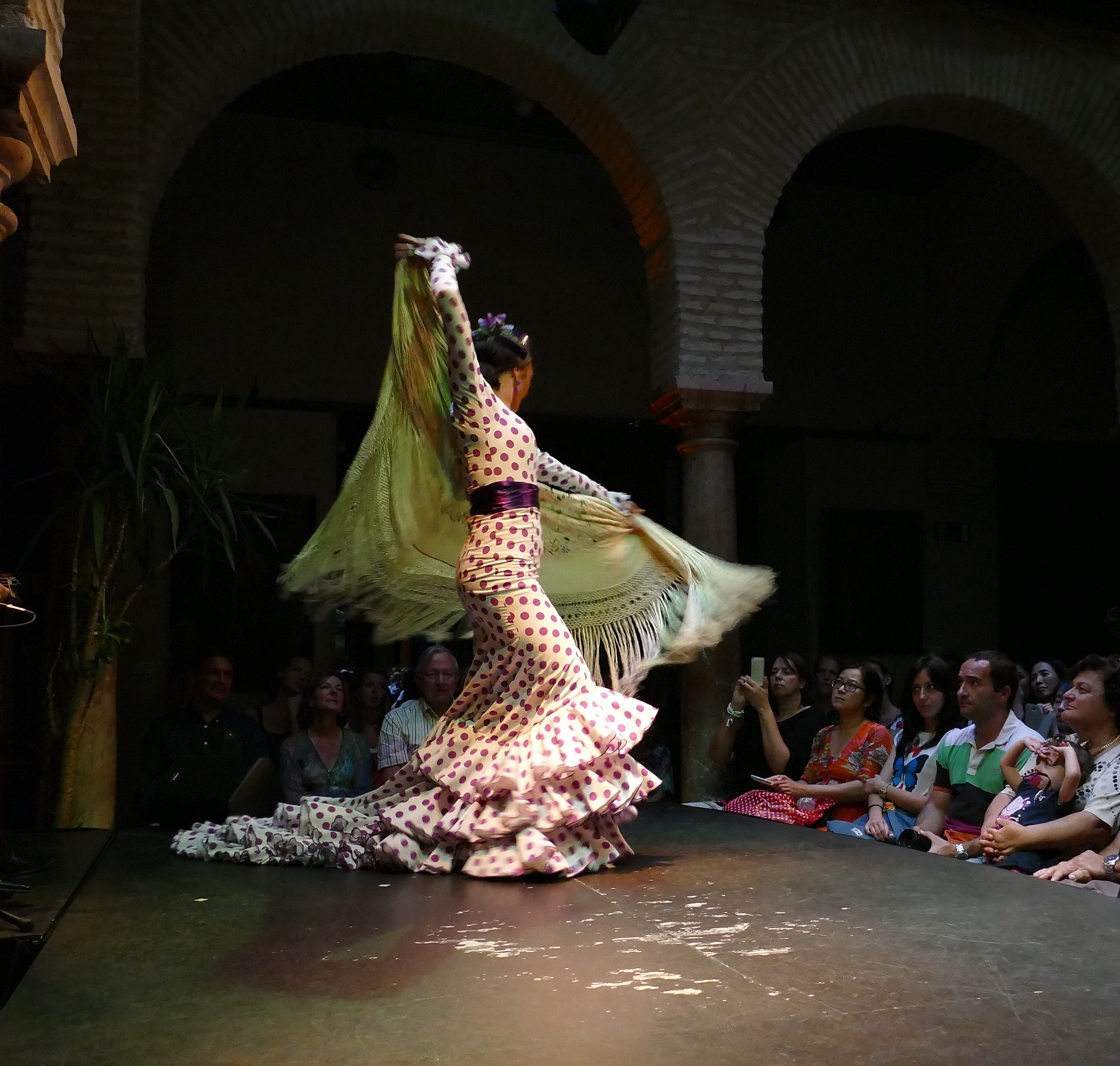 Flamencotänzerin im Museo del baile flamenco in Sevilla